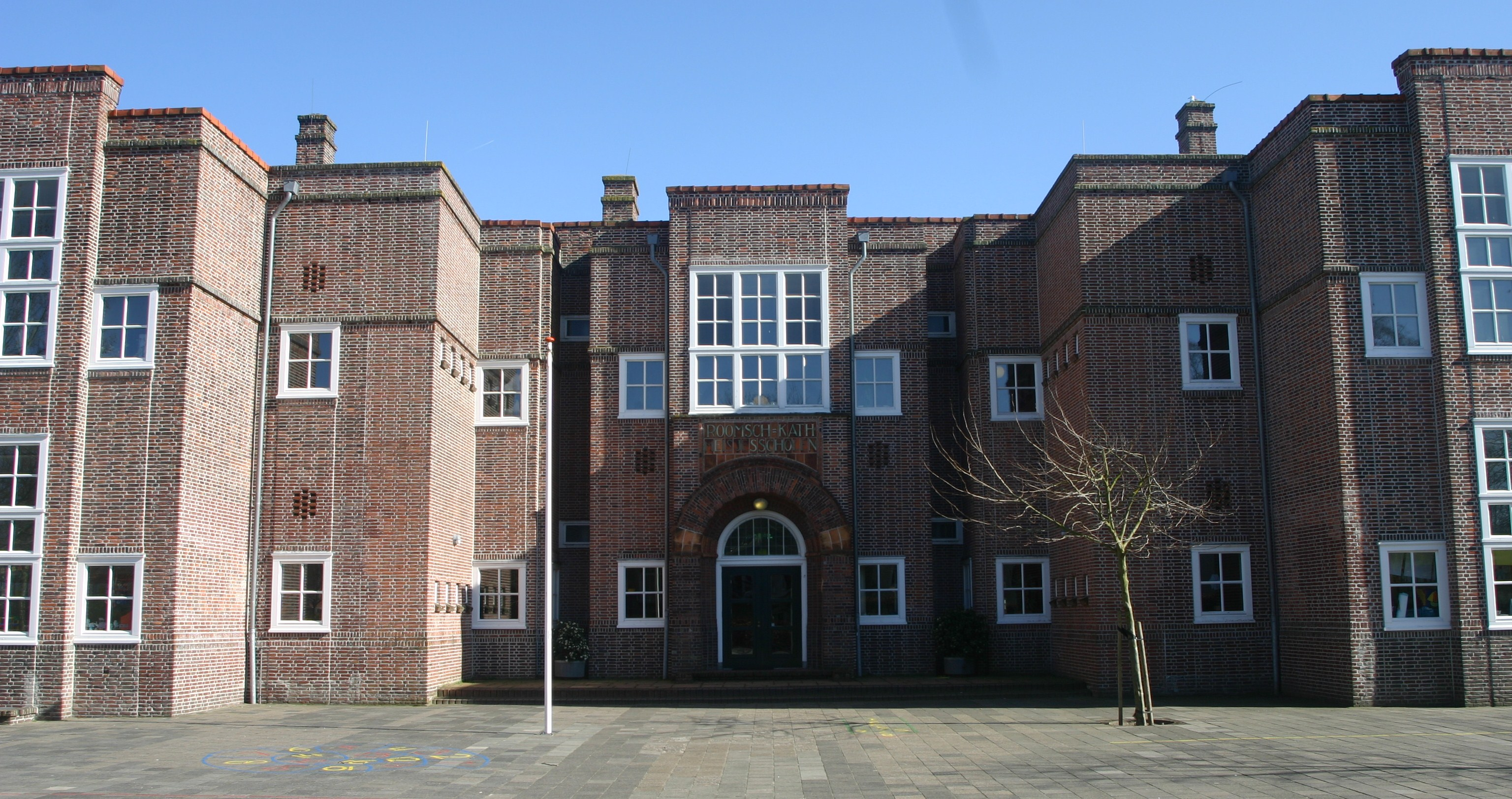 rijksmonumentnummer 511196.